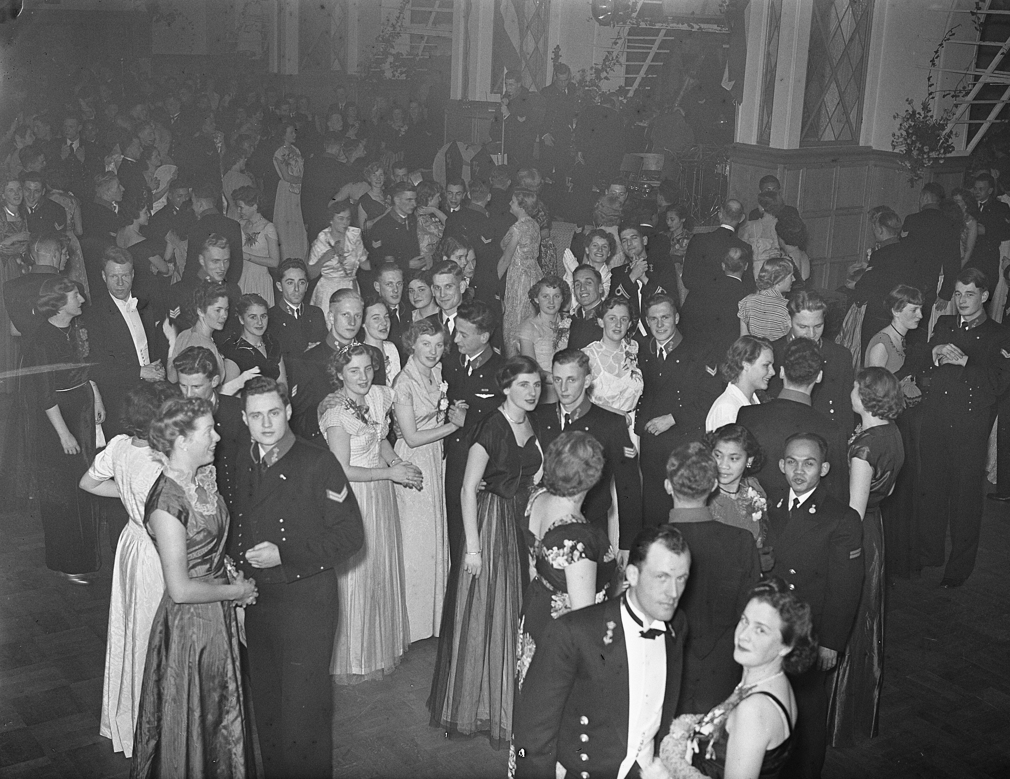 Collectie / Archief : Fotocollectie Anefo Reportage / Serie : [ onbekend ] Beschrijving : Adelborsten Assaut feest Den Helder Datum : 8 december 1950 Locatie : Den Helder Trefwoorden : adelborsten, feesten, marine Fotograaf : Bilsen, Joop van / Anefo Auteursrechthebbende : Nationaal Archief Materiaalsoort : Glasnegatief Nummer archiefinventaris : bekijk toegang 2.24.01.09 Bestanddeelnummer : 904-3490